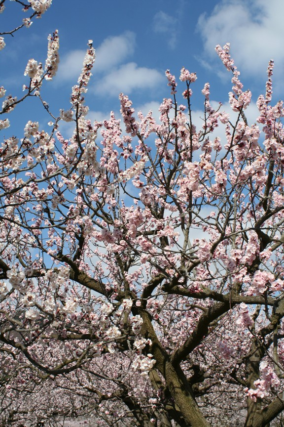 あんずの里現地で撮影